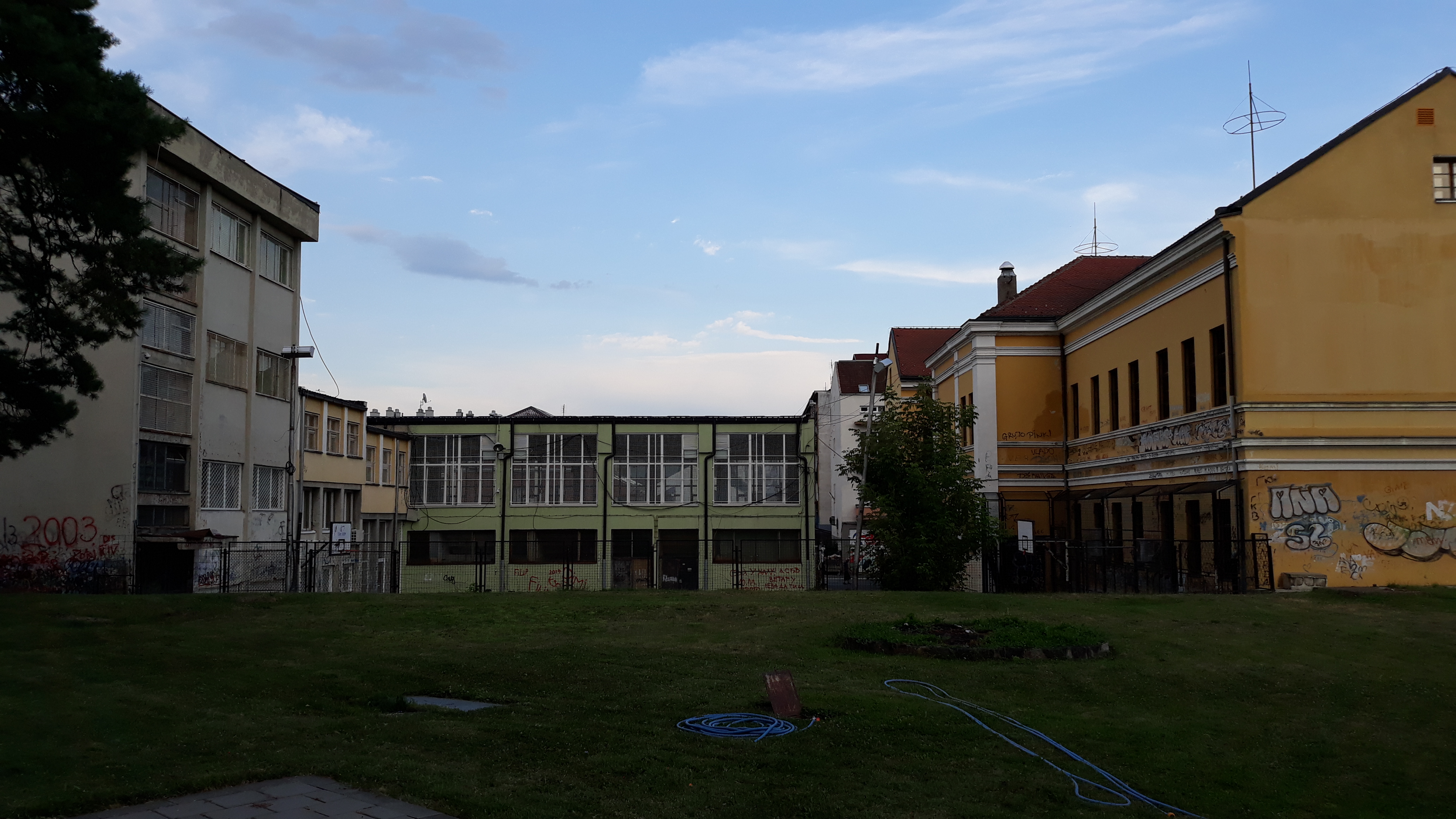 Зграда основне школе „Четврти краљевачки батаљон“, фотографисана из порте цркве Саборне цркве у Краљеву.